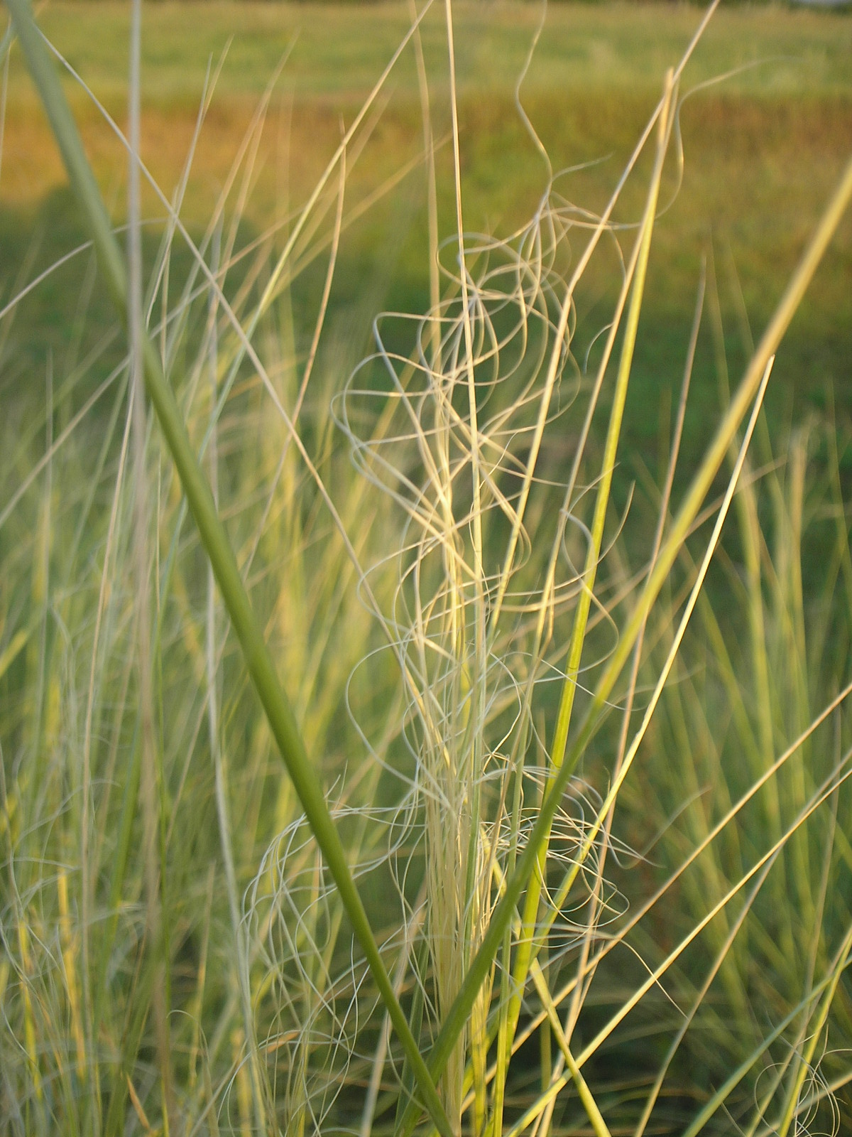 урочище Ромашково